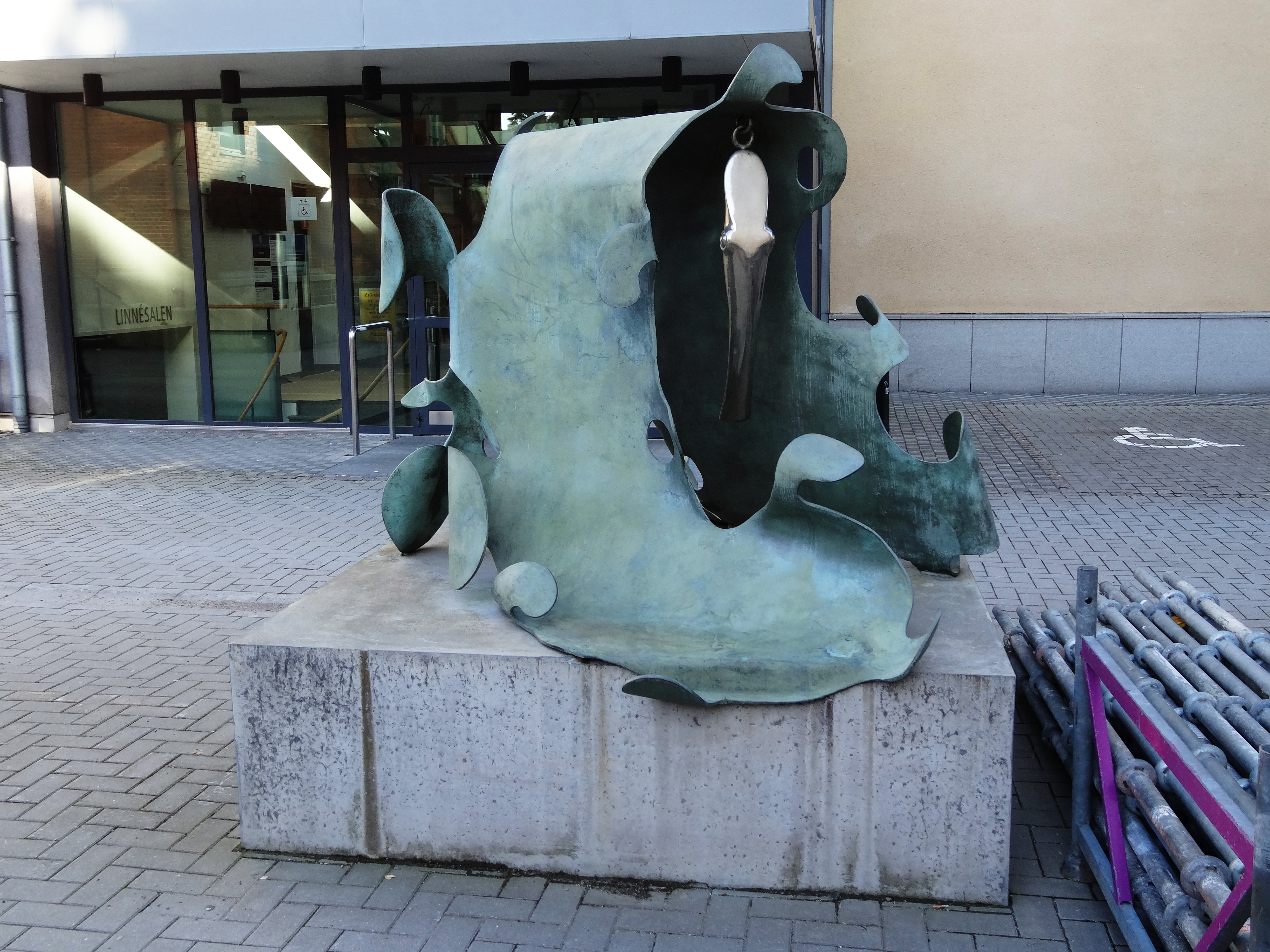 Ruska av Anders Kappel framför entrén till Institutionen för journalistik, medier och kommunikation vid Göteborgs universitet.